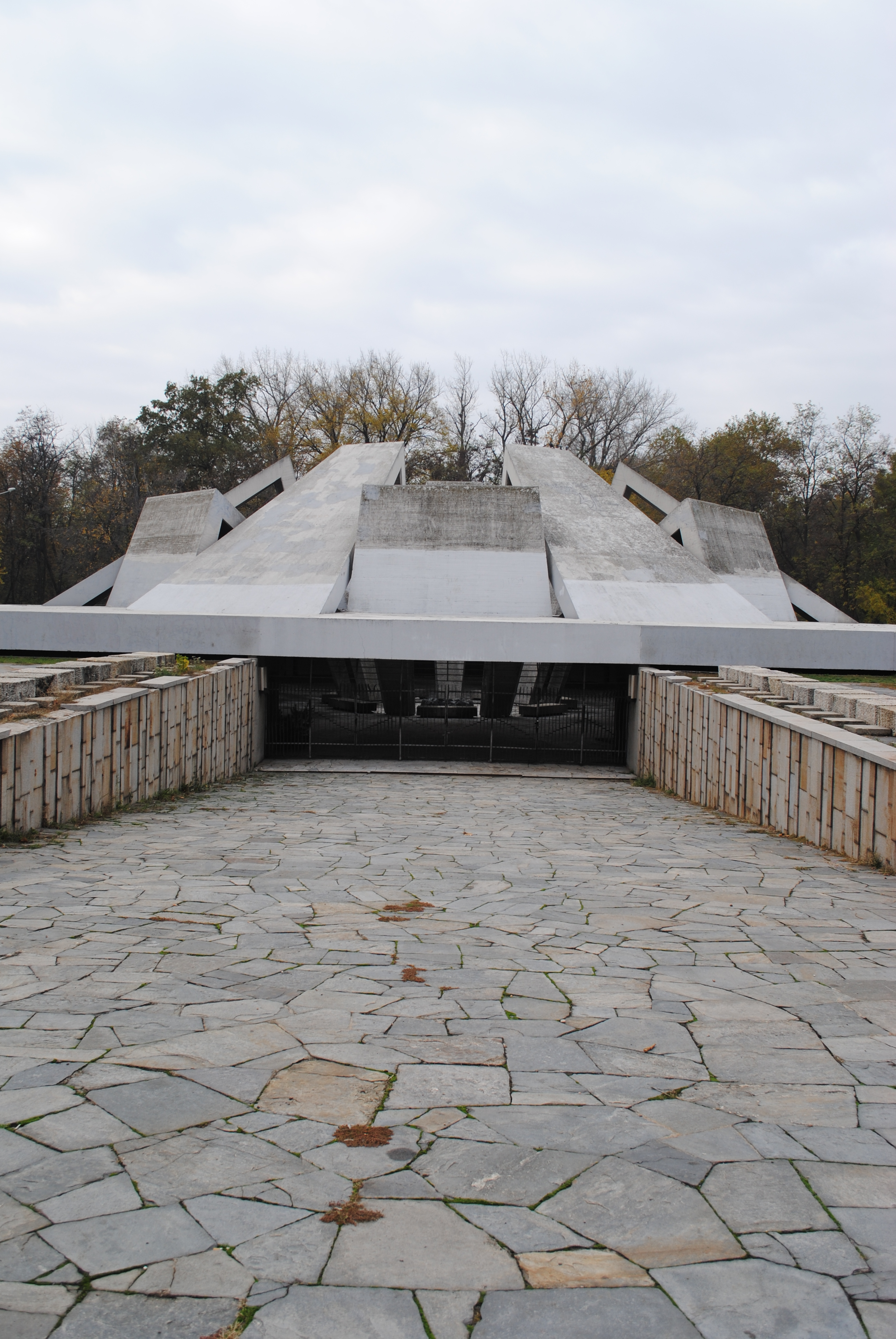 Братската могила в Пловдив